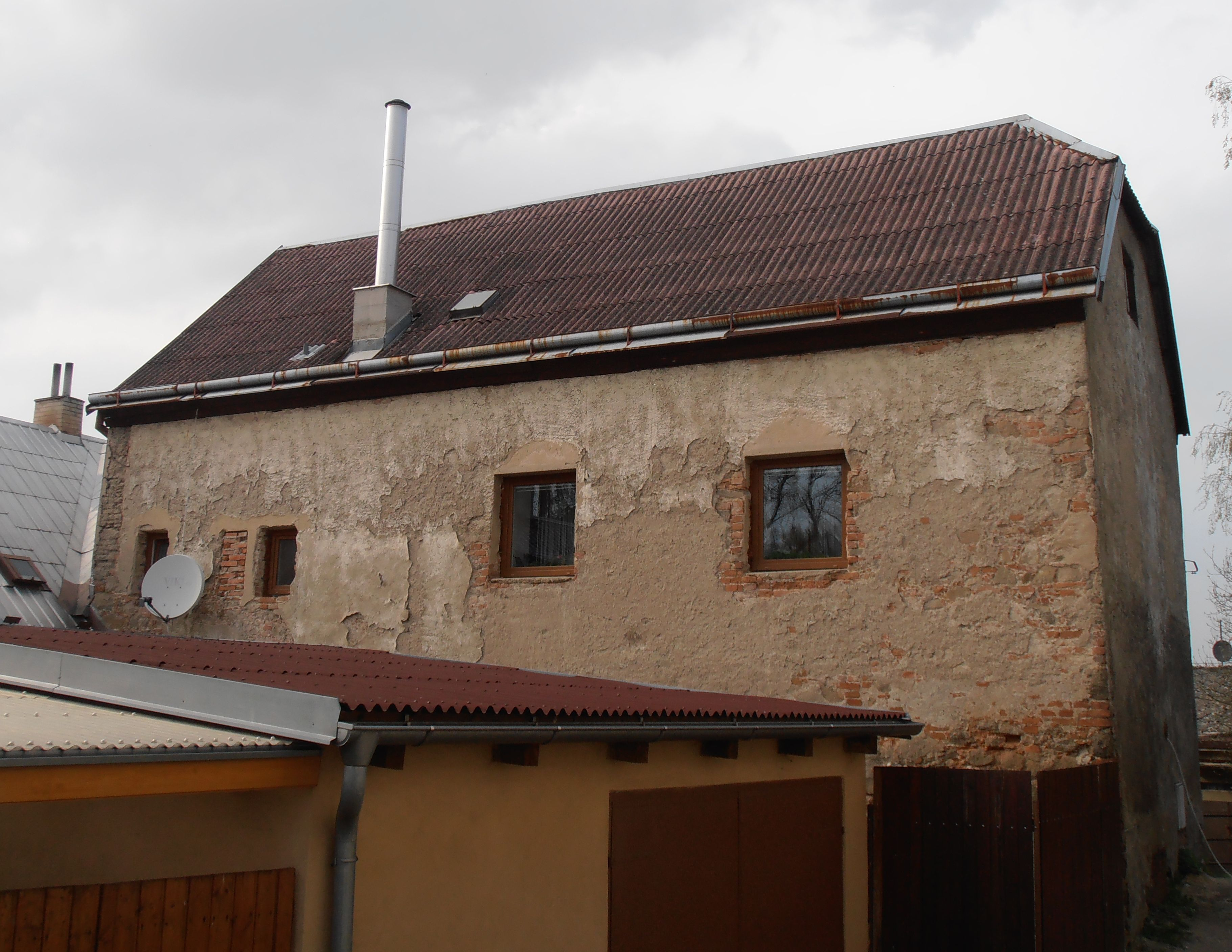 Bývalá synagoga v Puklicích.